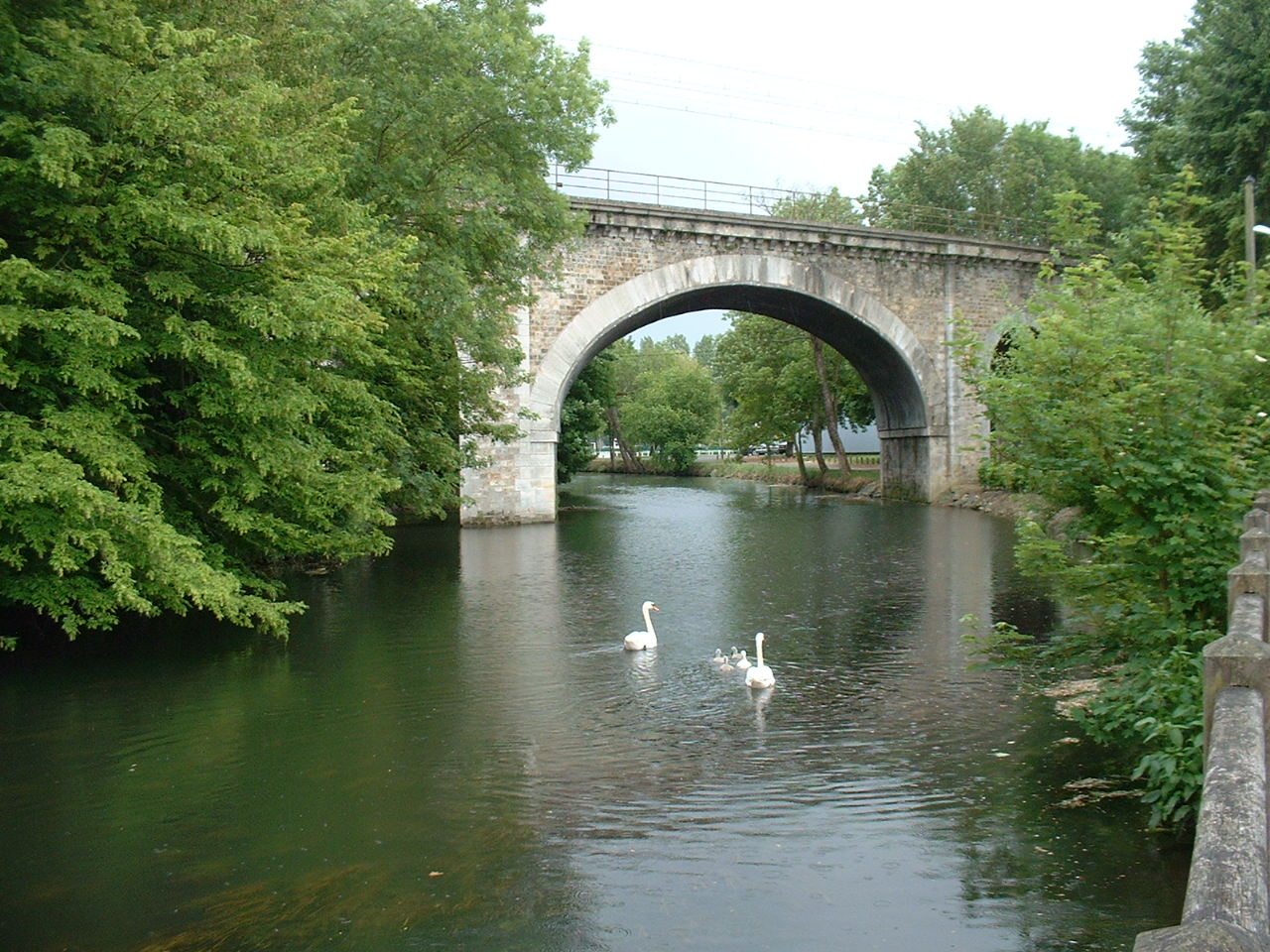 L'Eure à Chartres près des Grands Prés, viaduc de la ligne Paris-Montparnasse à Brest. Licensing Auteur: Clicgauche Source: Clicgauche (photographie personnelle)